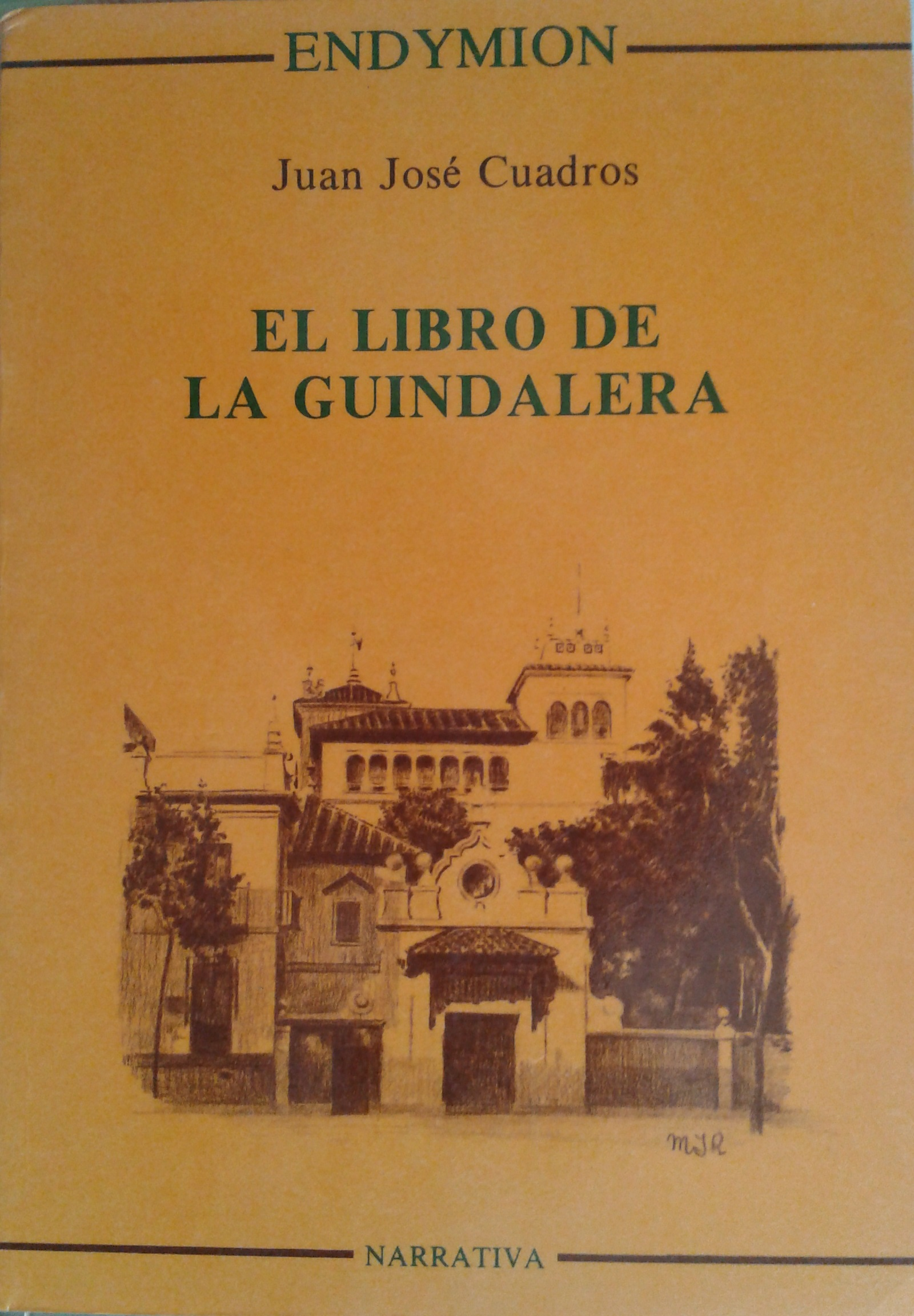 El libro de la Guindalera de Juan José Cuadros Pérez, 1992